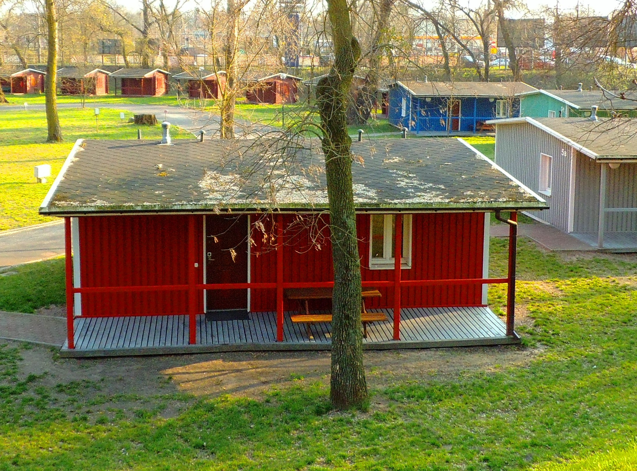 Camping Tramp w Toruniu2